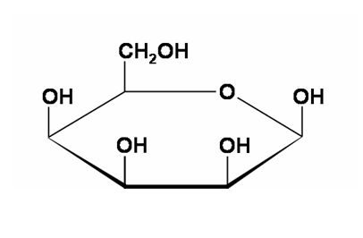 Representación de una molécula de β-D-Talopiranosa.